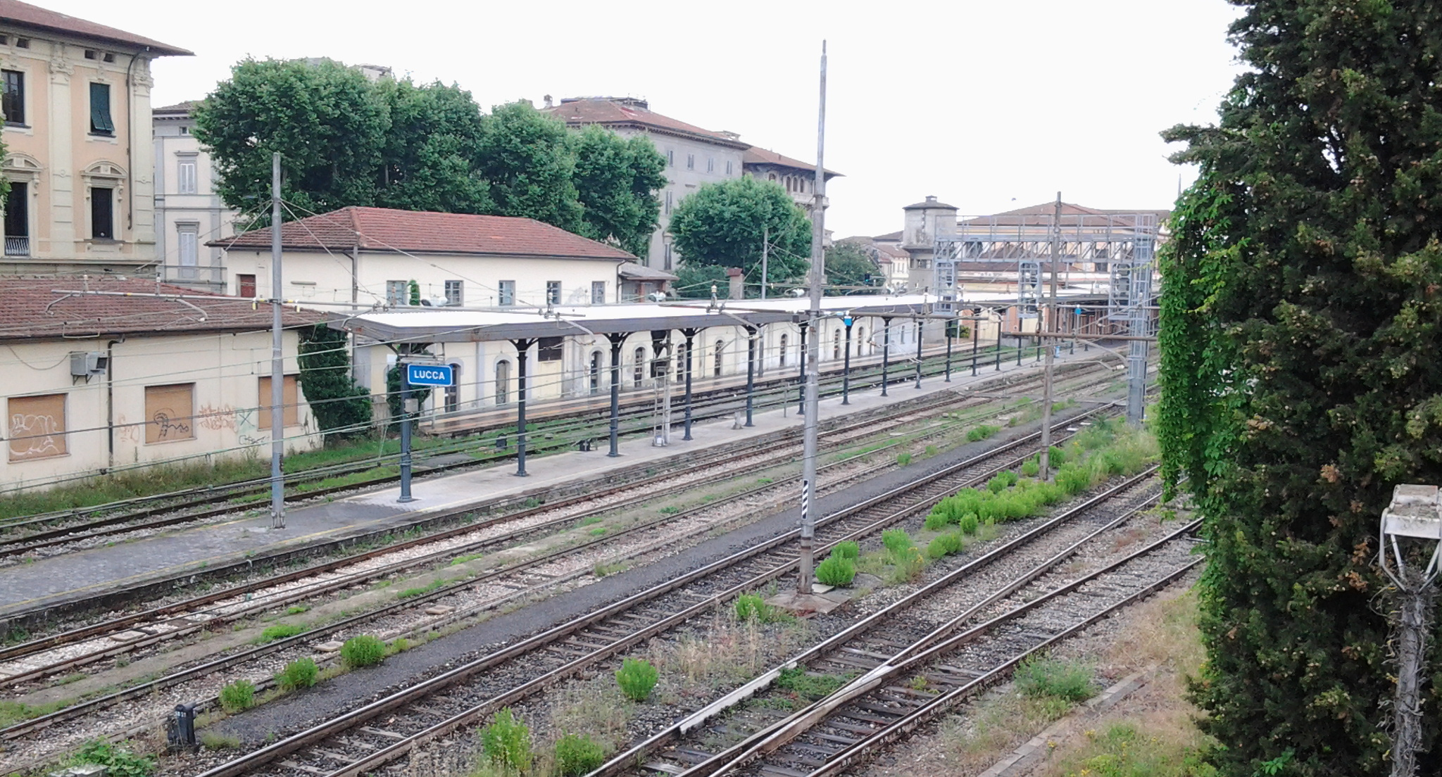 stazione ferroviaria di Lucca